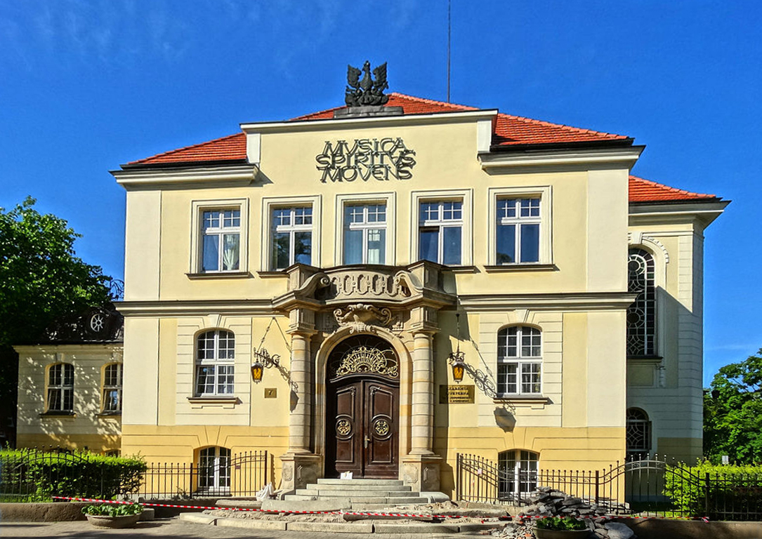 Zespół Urzędu Powiatowego, zbud. 1904-1906, ob. budynek główny Akademii Muzycznej w Bydgoszczy przy ul. Słowackiego